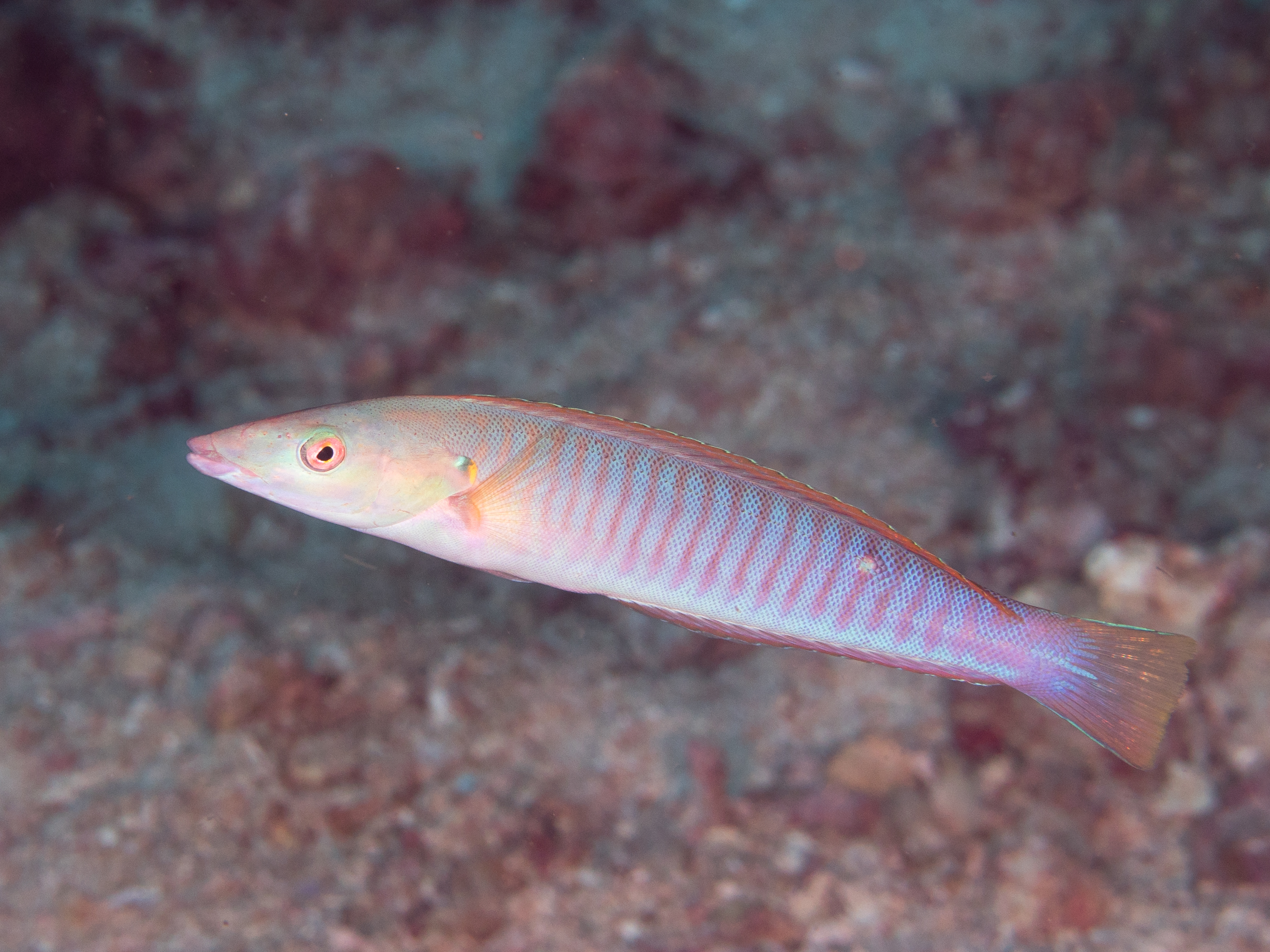 Lembeh, Indonesia - Pastel ringwrasse (Hologymnosus doliatus)